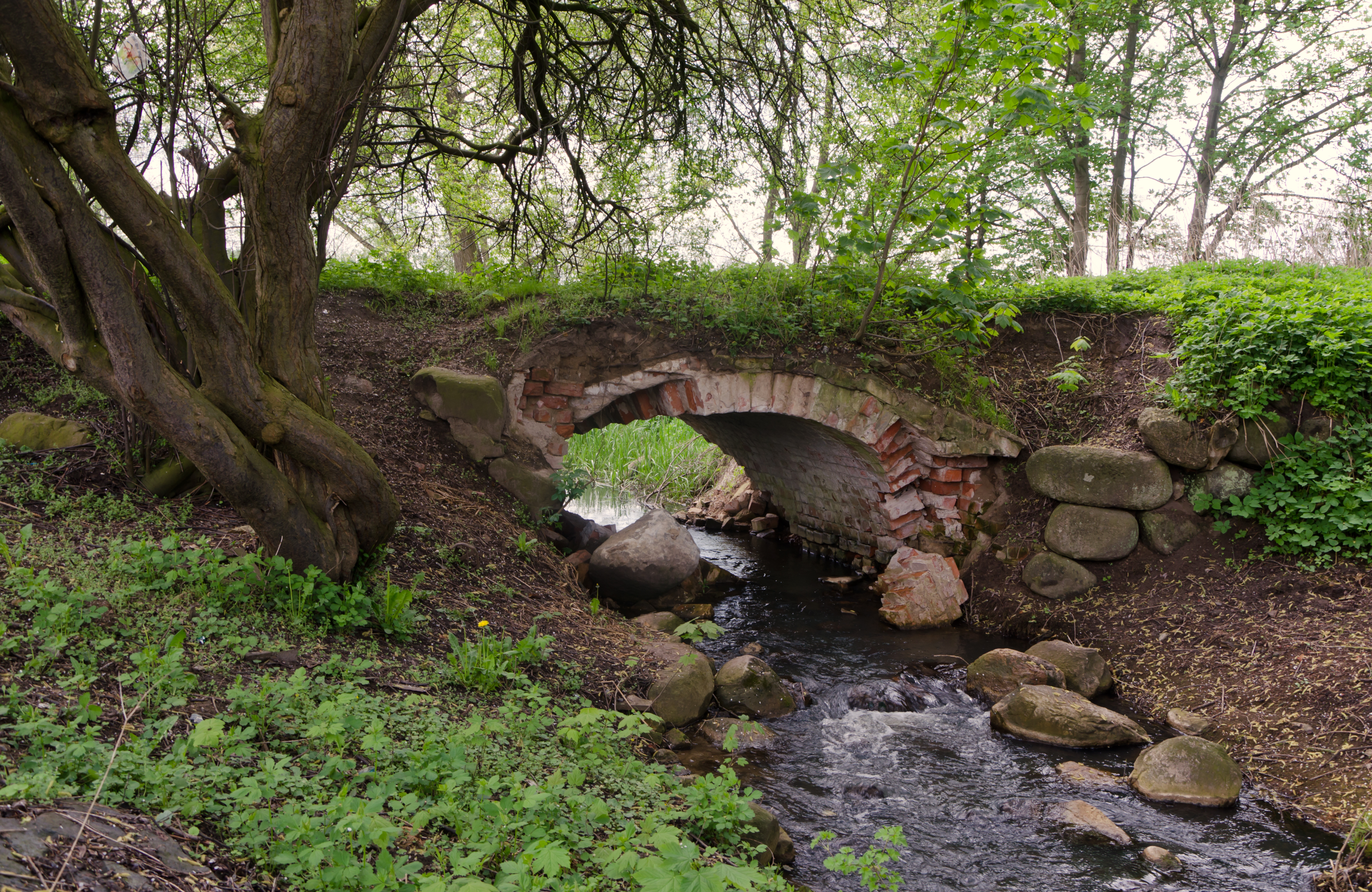 Parkentin Brücke des Kirchensteiges von Norden - Ob es sich wirklich um die als Baudenkmal klassifizierte Brücke handelt, konnte vor Ort nicht abschließend geklärt werden!